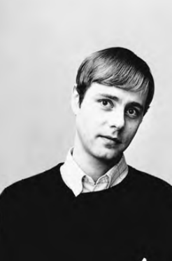 Klas Burling 1960-tal